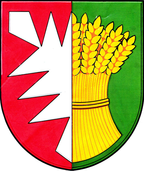 Znak obce Němčice (okres Kroměříž)